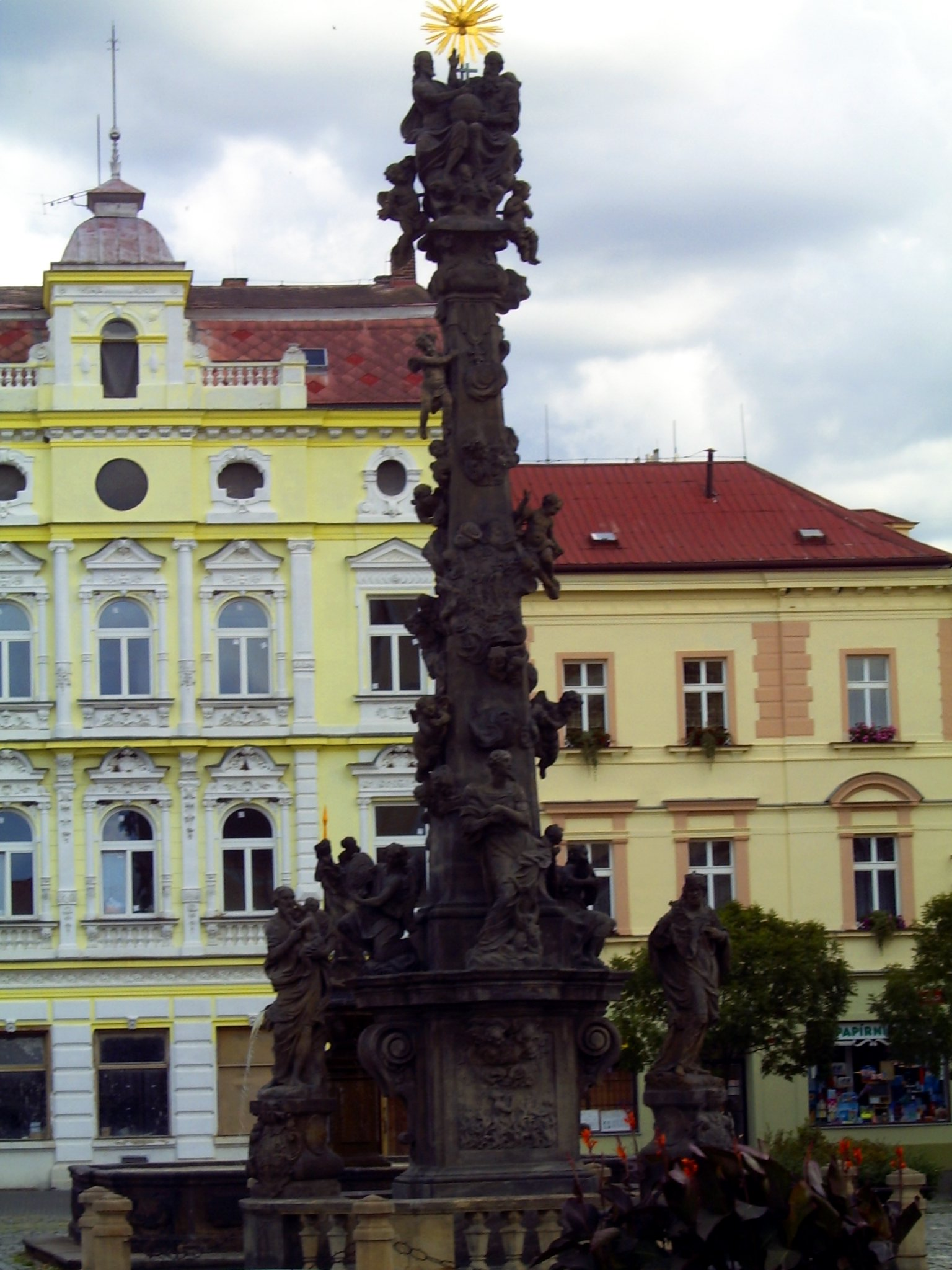 Pestsäule in Dux (Tschechien) Hornjoserbsce: Morowy stołp na radnicowym naměsće w Duchcovje.